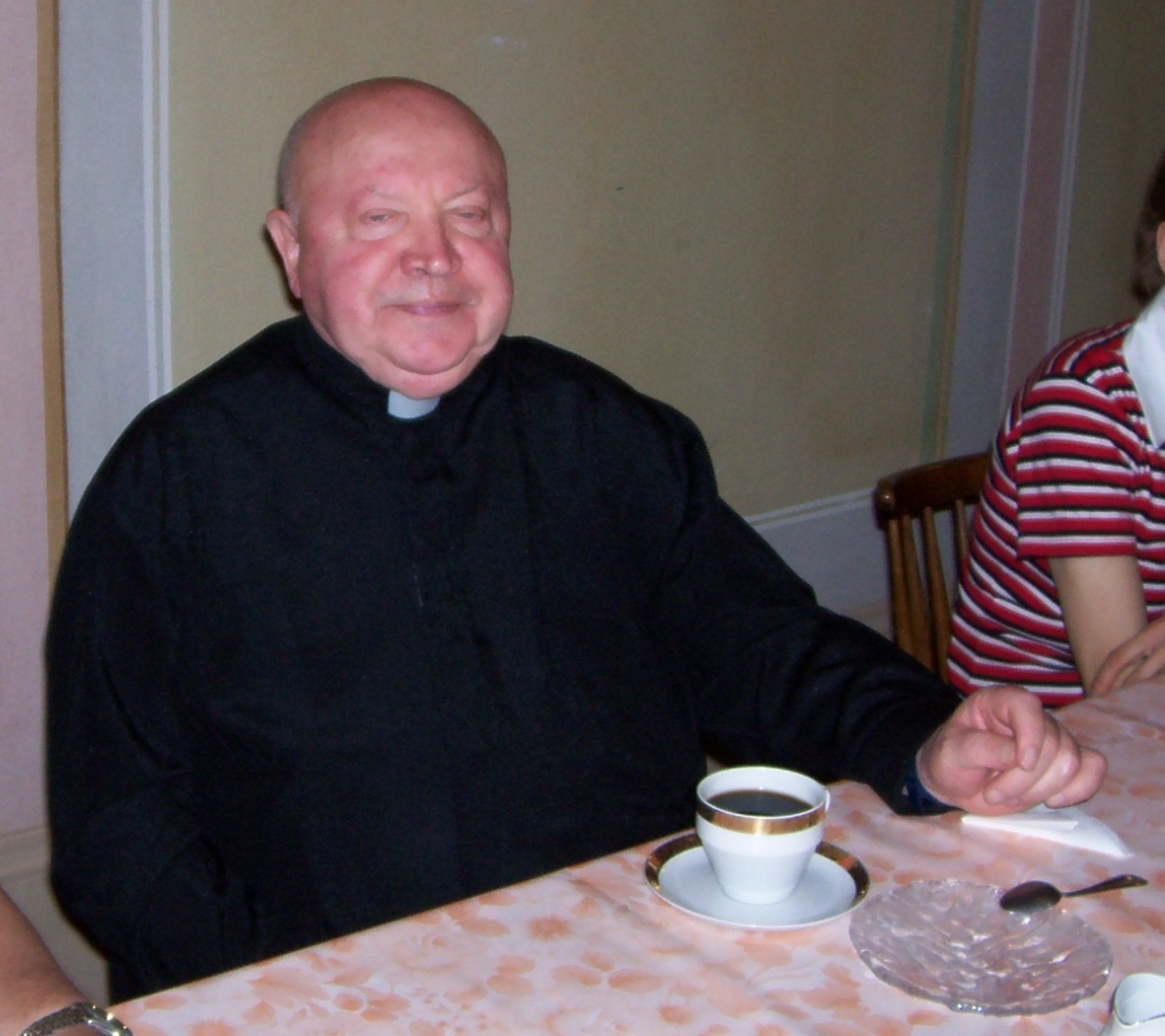 salesián Josef Pekárek při návštěvě Litoměřic 27. srpna 2006